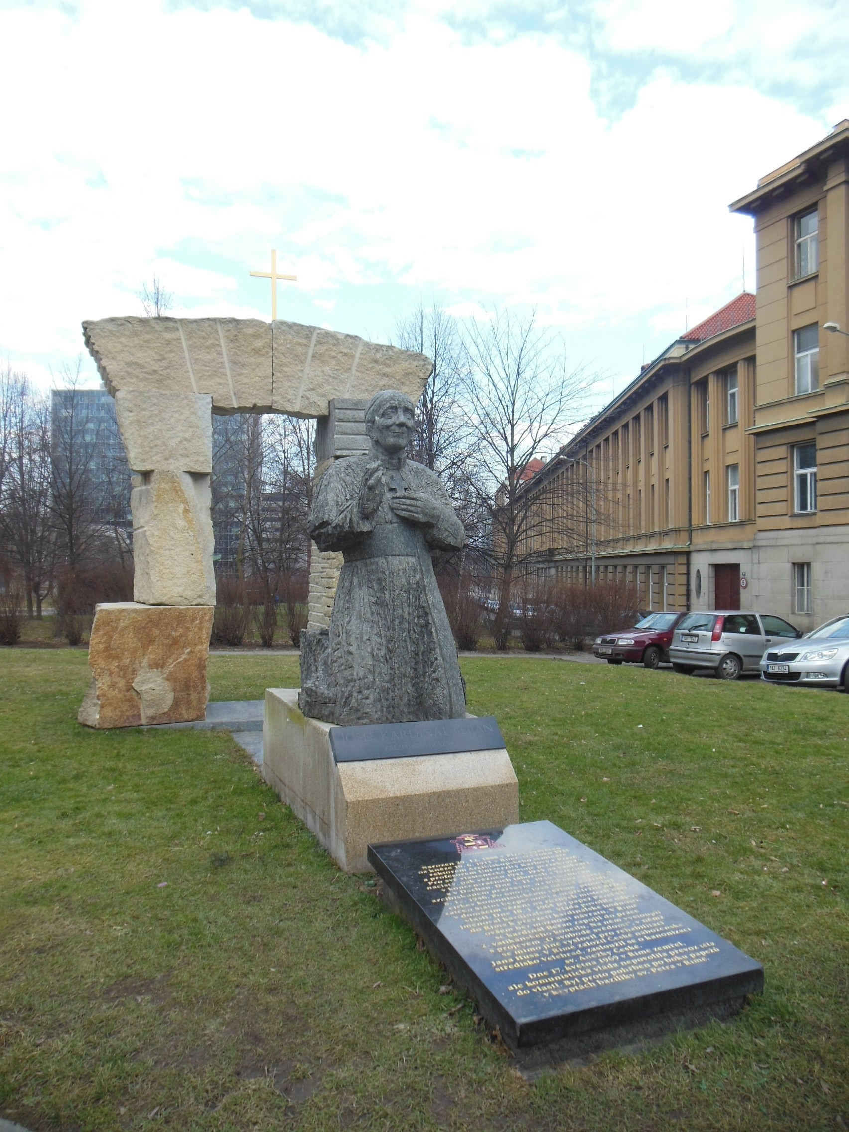 Pomník Josefa kardinála Berana v parku mezi ulicemi Thákurova a Salabova v Praze-Dejvicích.